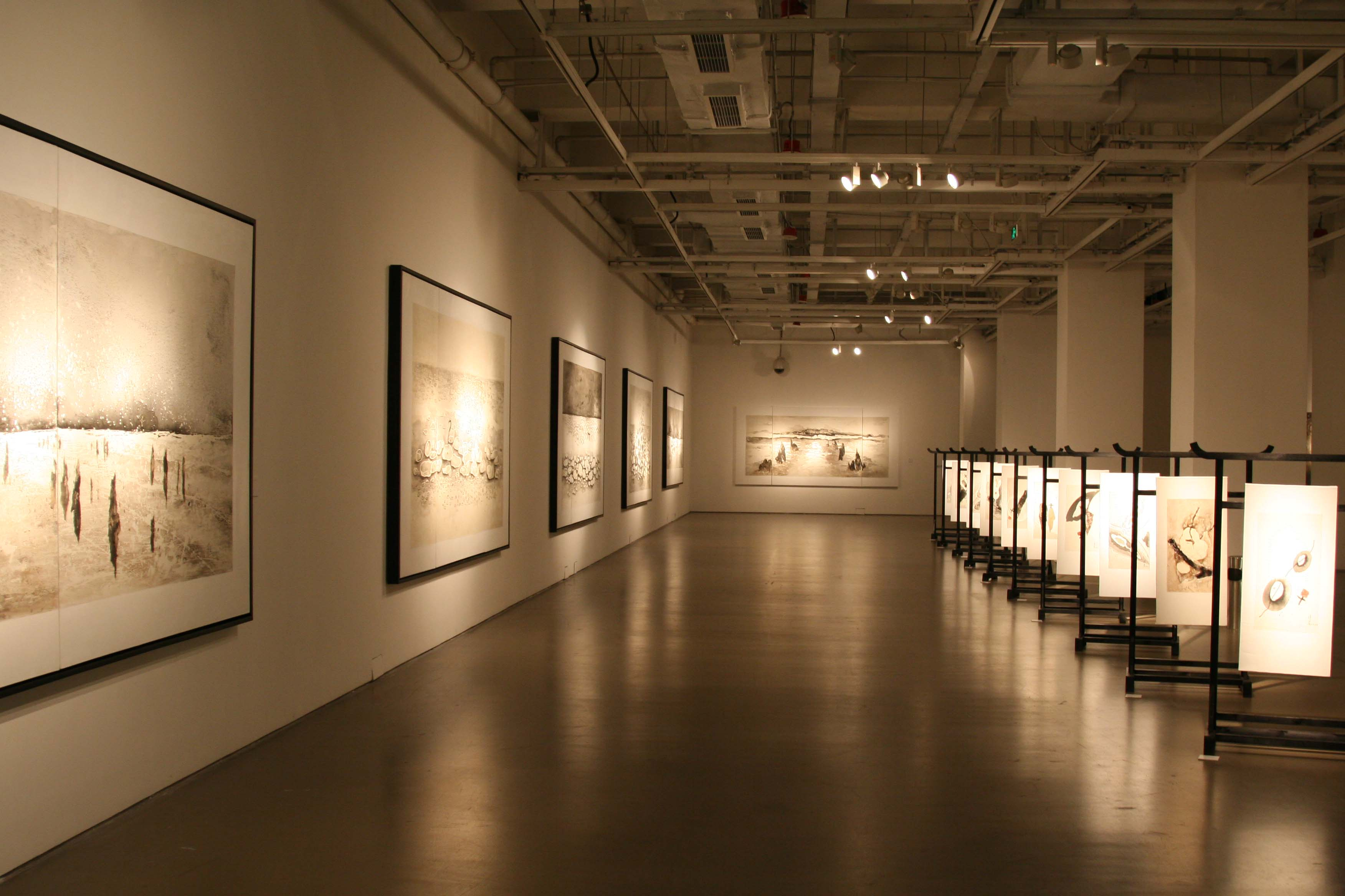 Retrospective de Li Chevalier Today Art Museum, Pékin